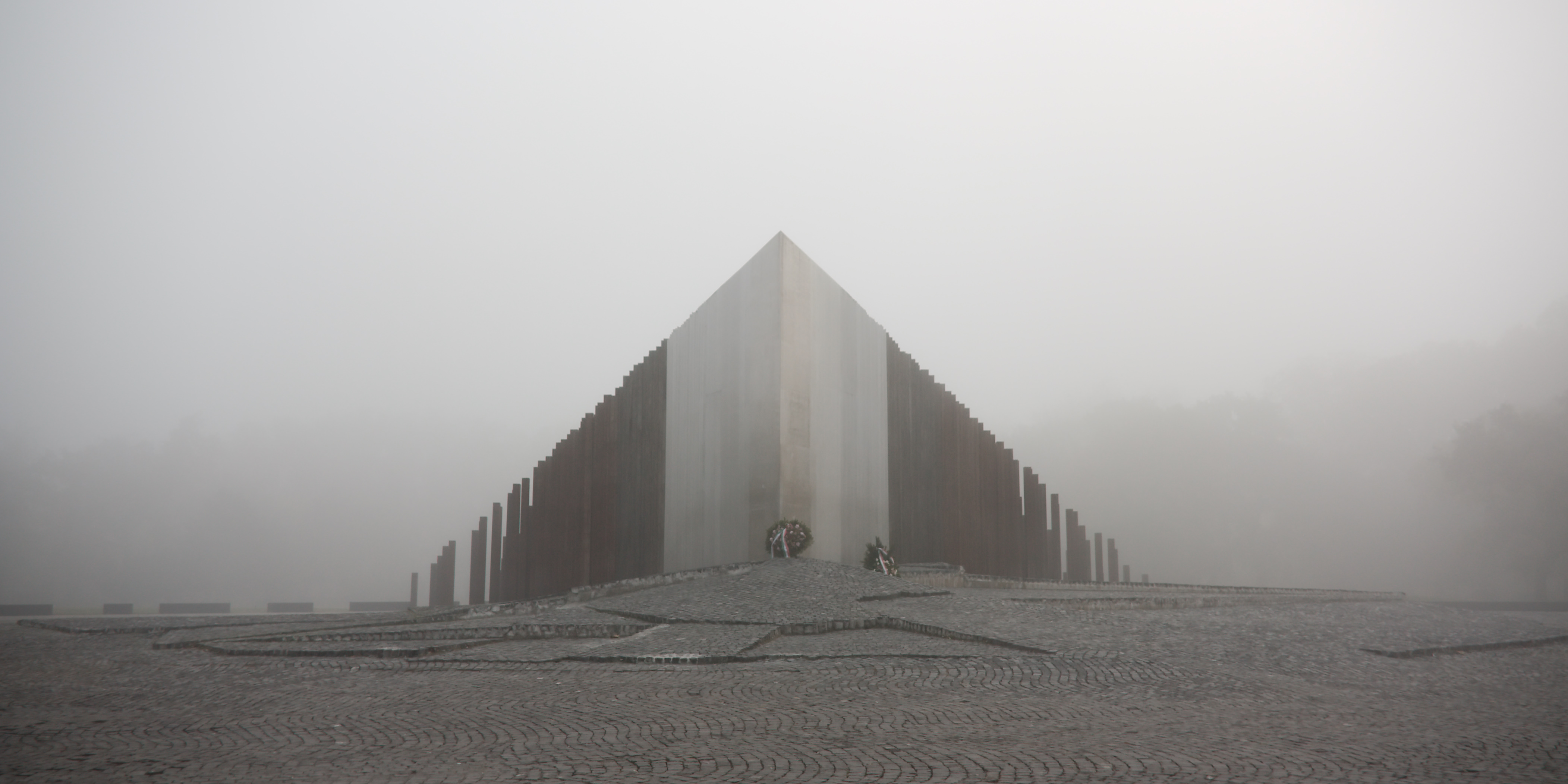 56-osok tere, 1956-os központi emlékmű